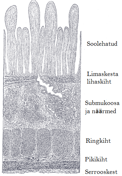 Kassi kaksteistsõrmiksoole läbilõige